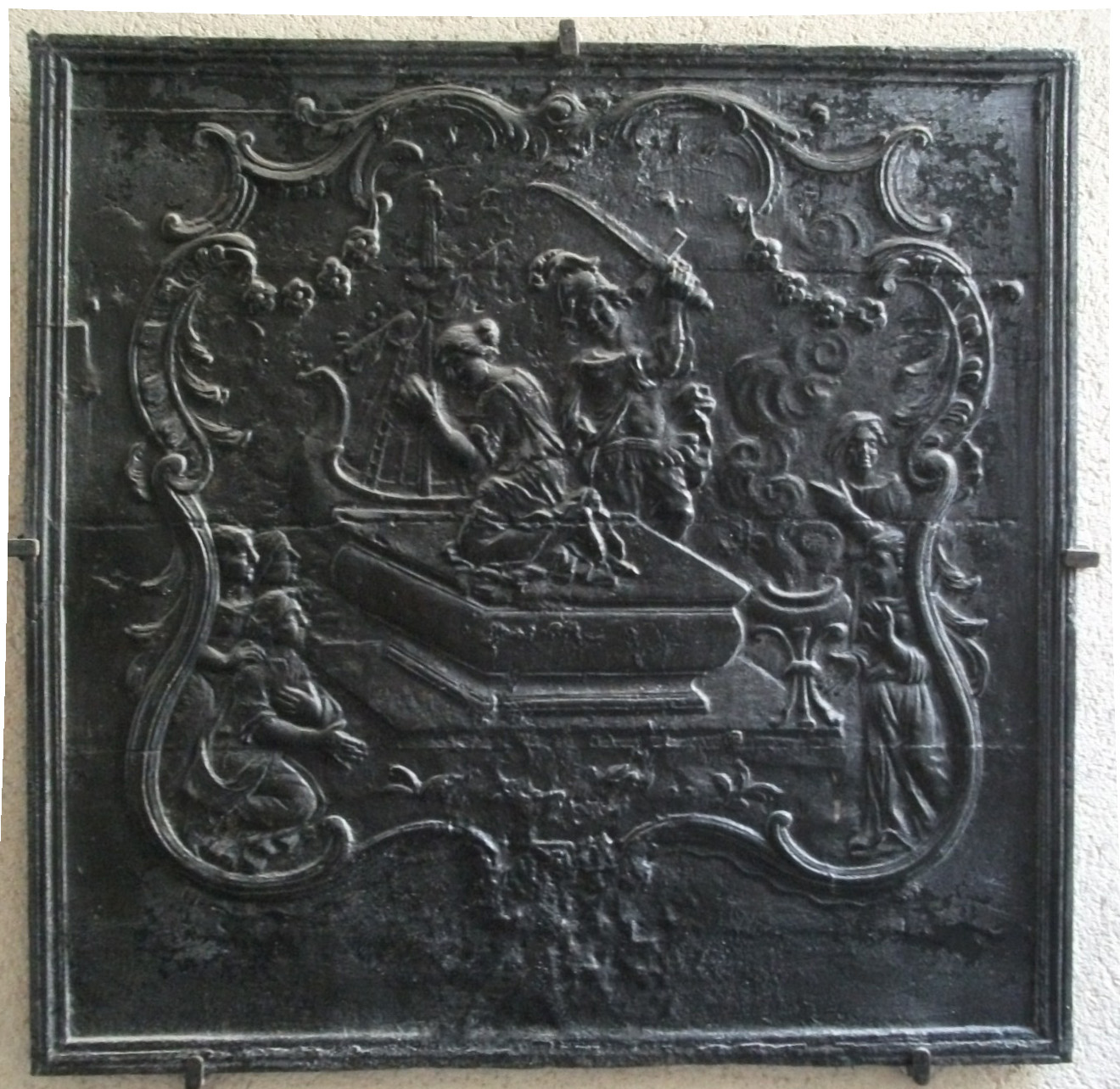 Plaque de cheminée époque Louis XV dans le passage Wendel. Don M.Pascal .